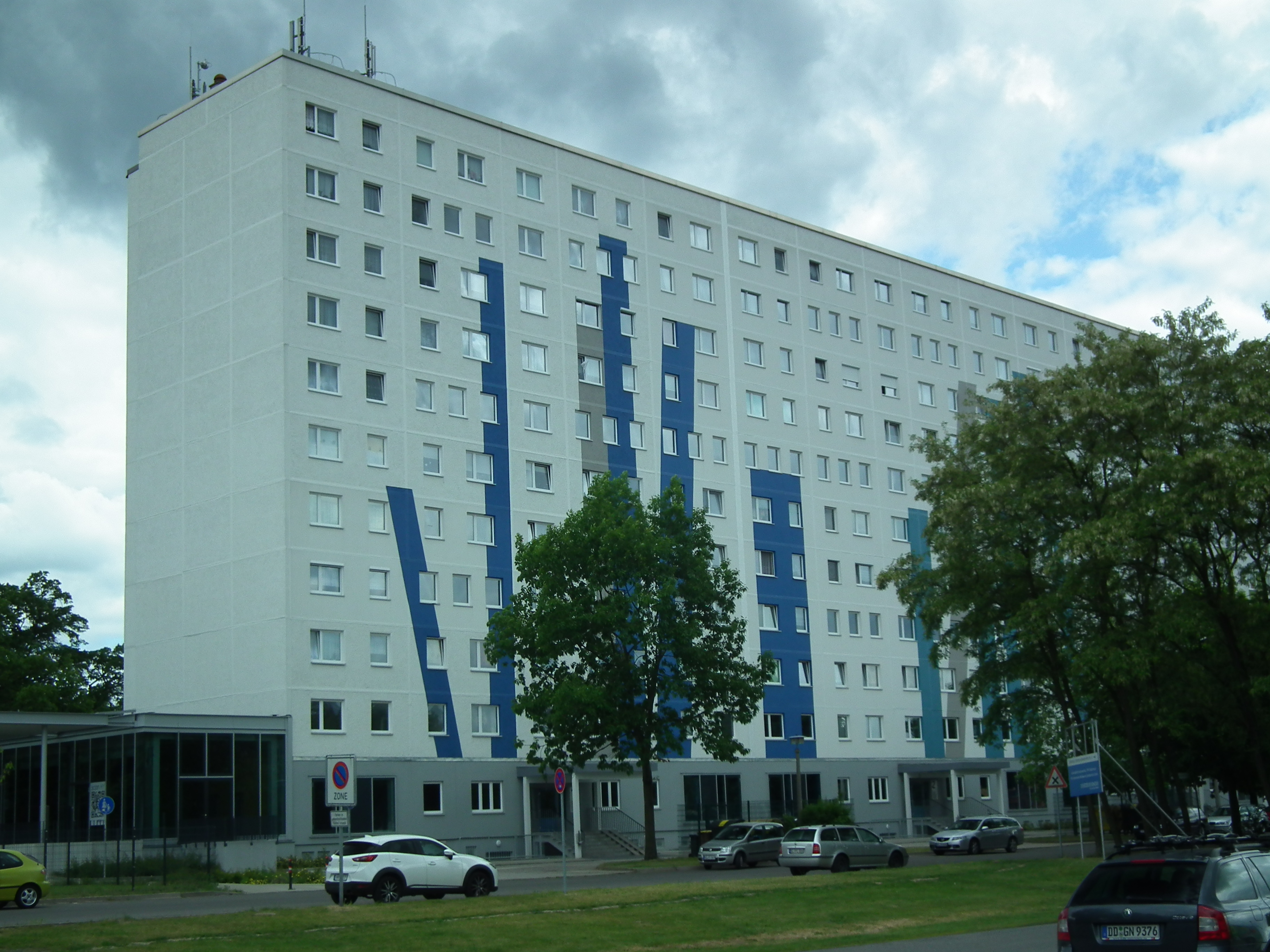 Hoyerswerda Hornjoserbsce: We Wojerecach.